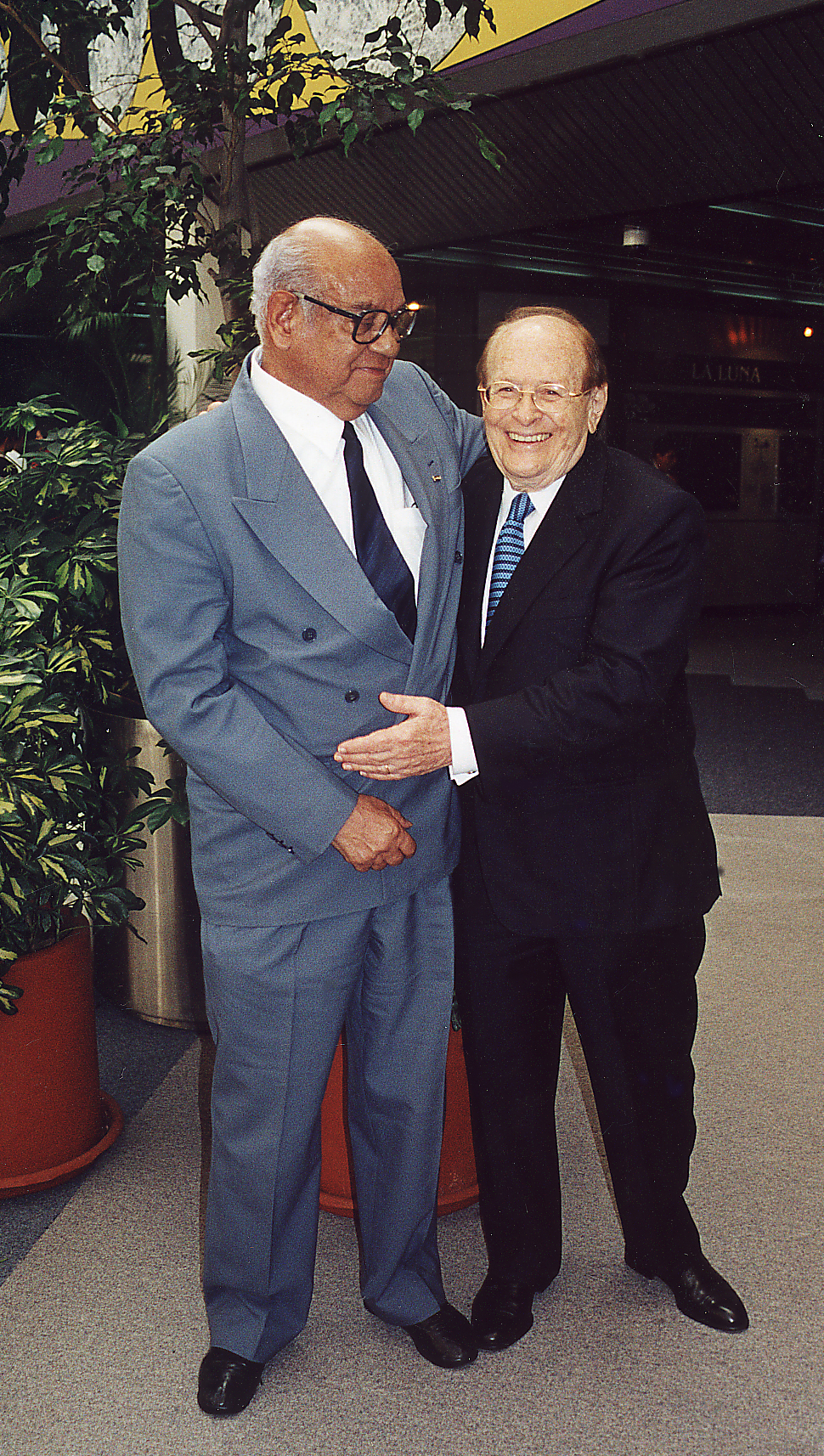 George Rosenkranz (derecha) y Luis E. Miramontes (izquierda), 2001 en la UNAM